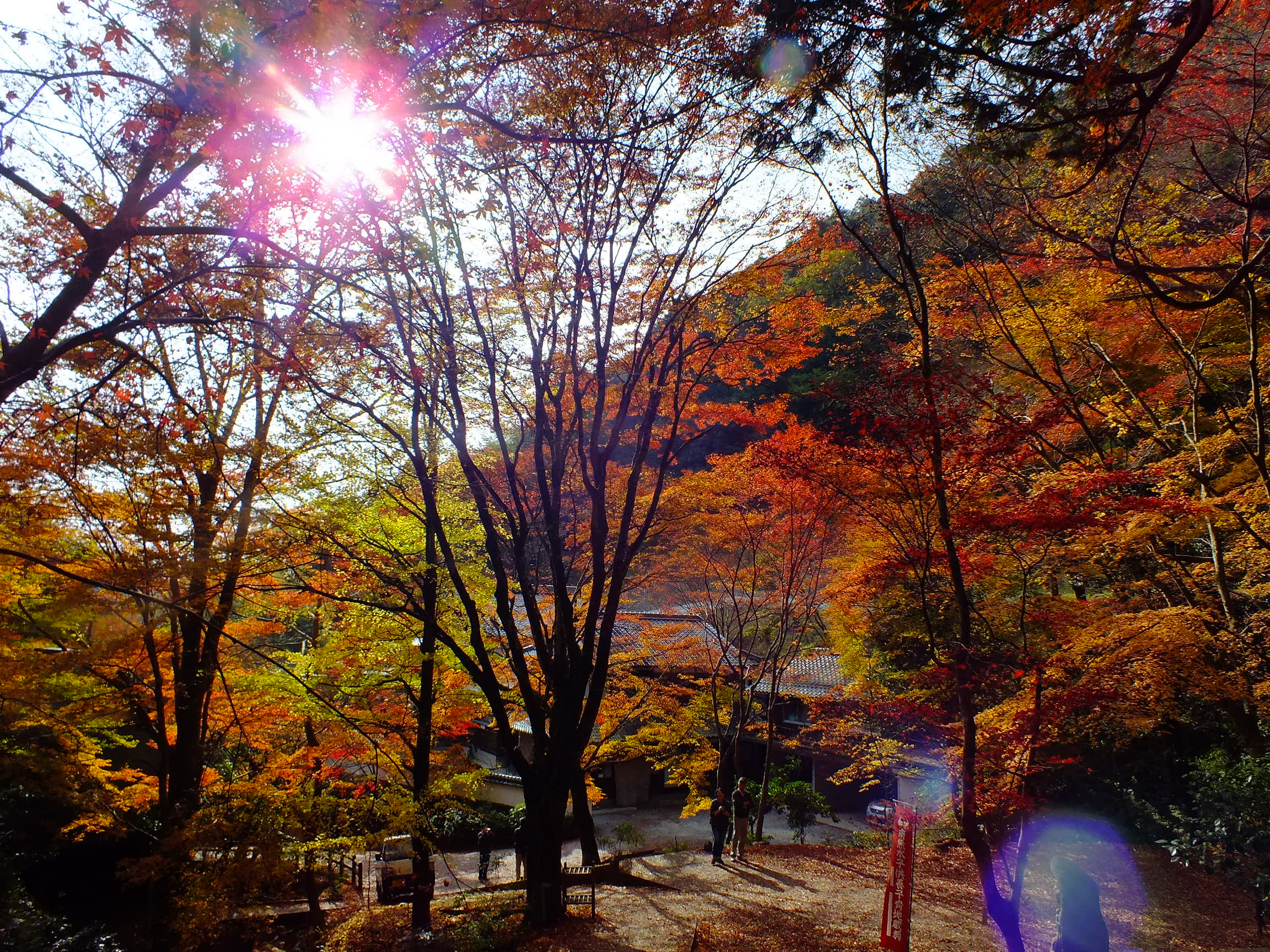 2014-11-24 Sekiganji 石龕寺